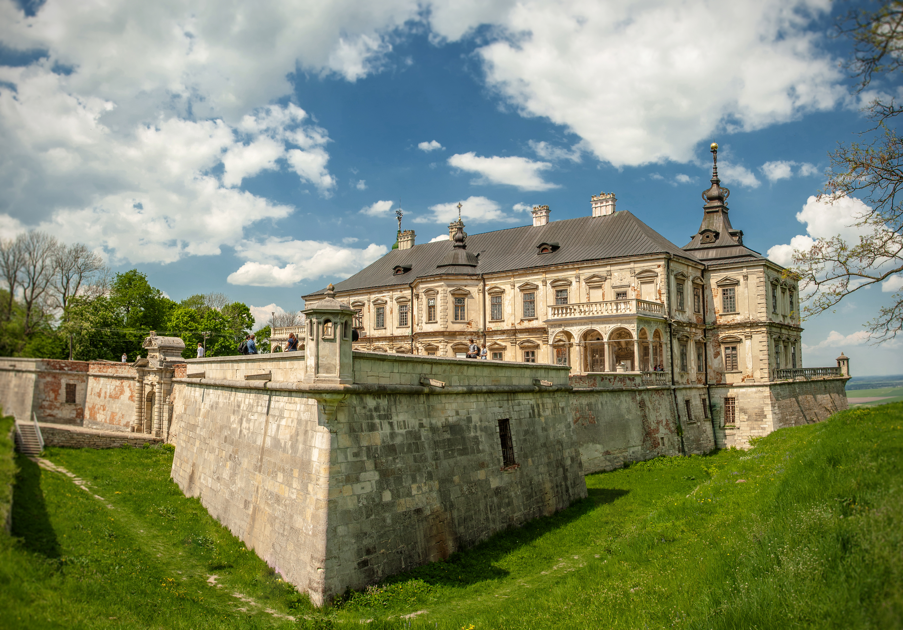 Підгорецький парк, Бродівський р-н, с. Підгірці